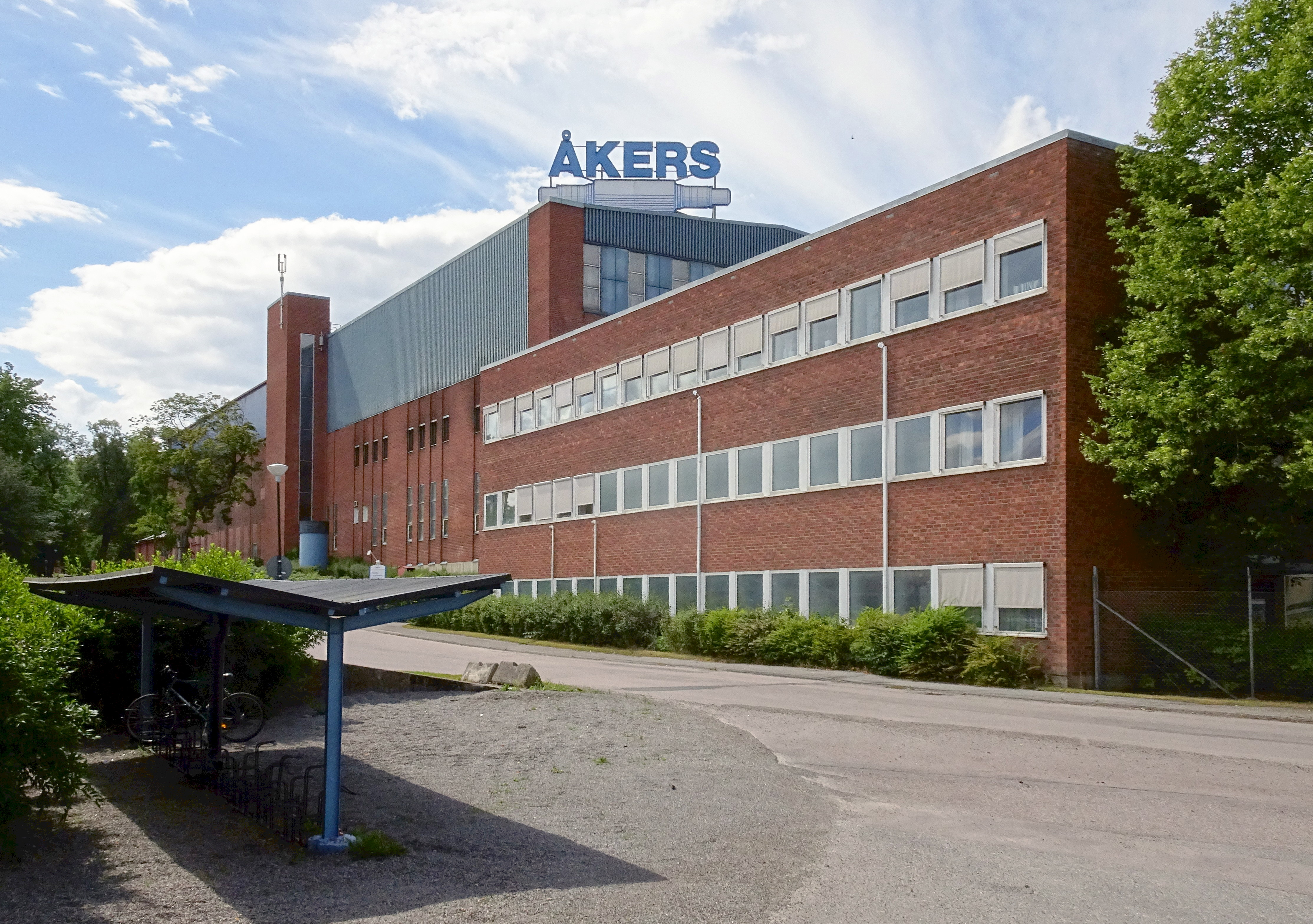 Åkers, dagens fabrik